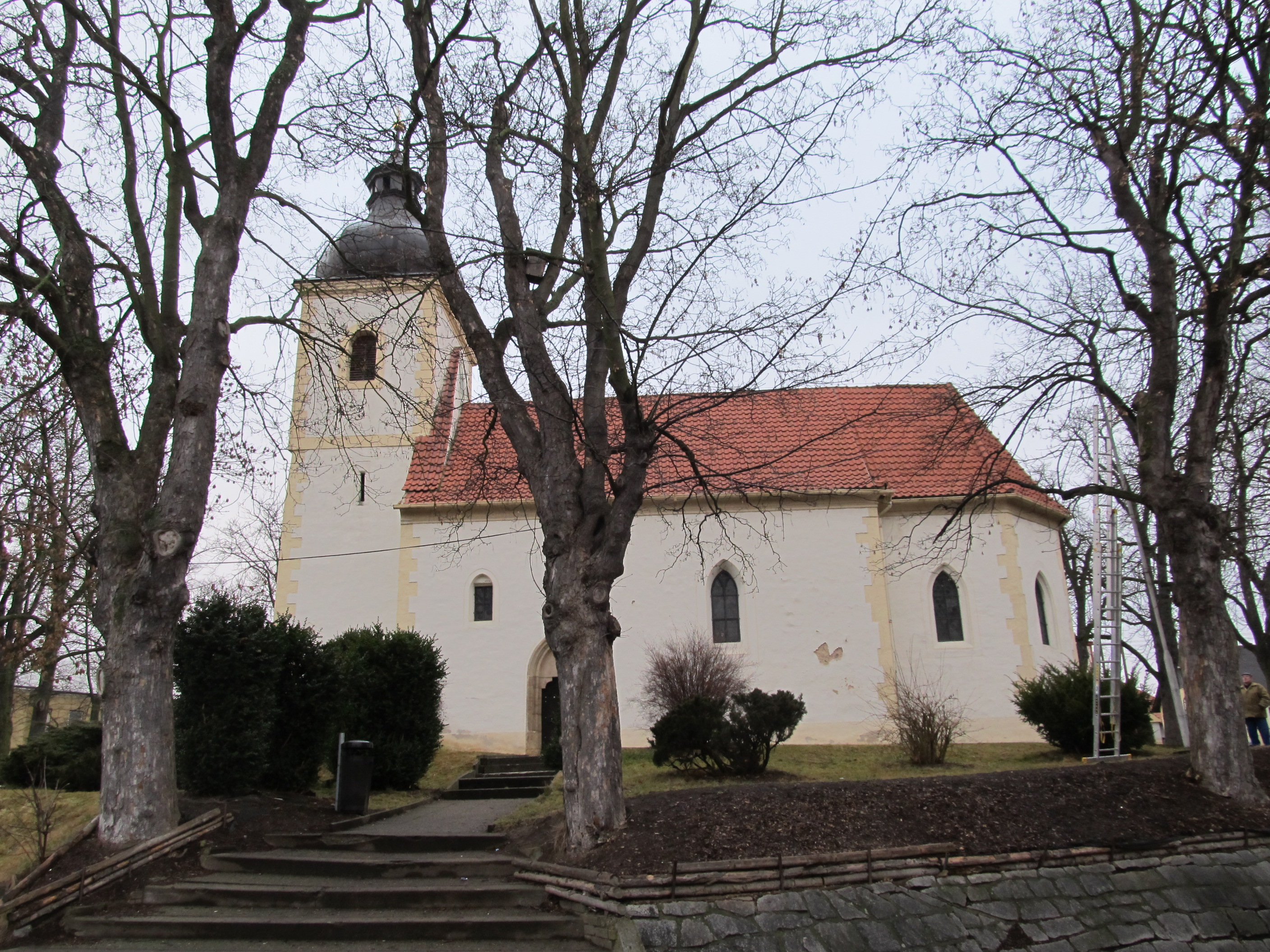 Nezvěstice - kostel Všech svatých